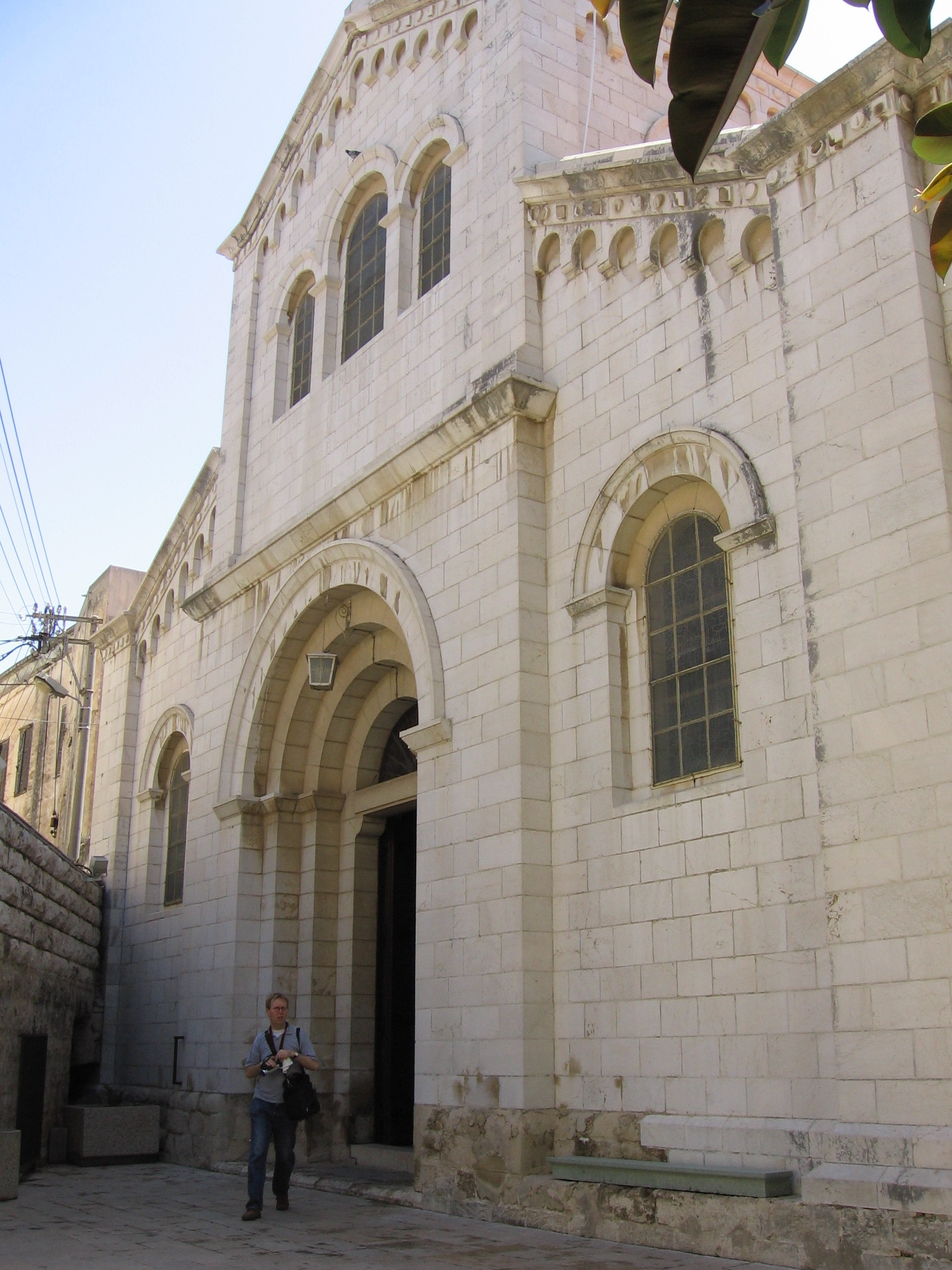 Chiesa di San Giuseppe a Nazareth